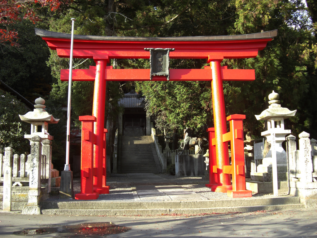 兵庫県姫路市林田町 祝田神社